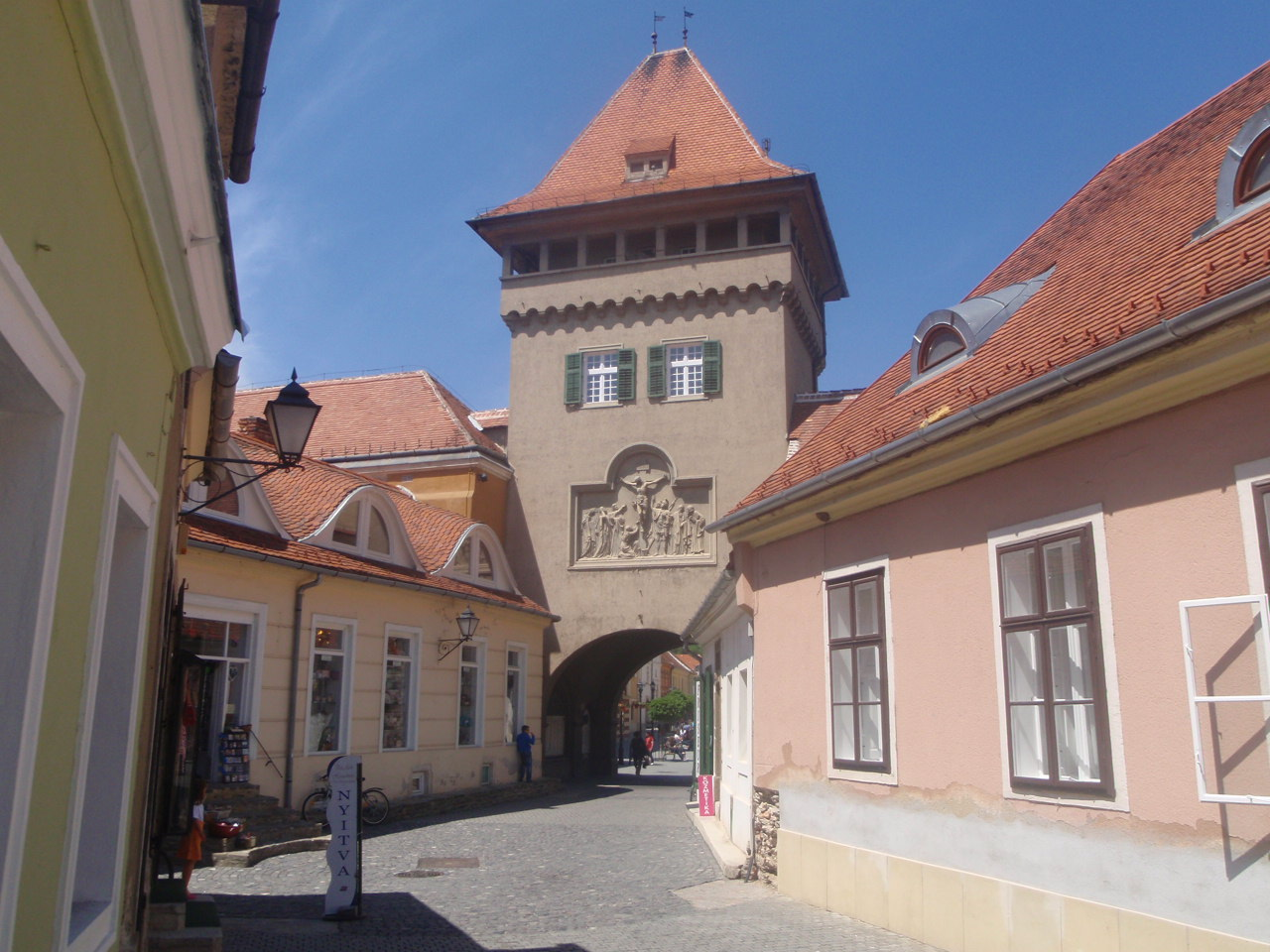 Hősök tornya a megújult Városháza utcával